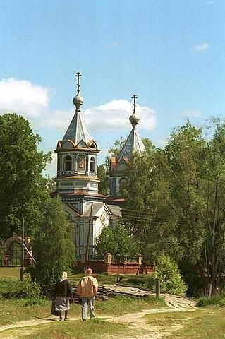 Каменка (Воротынский район) 2002 год.